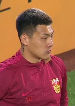 Ван Далэй